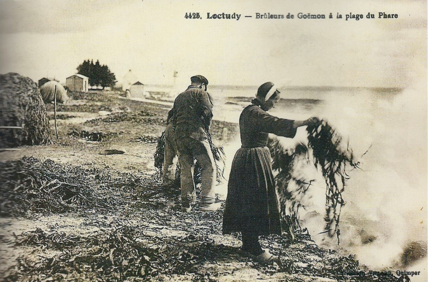 Loctudy : brûleurs de goémon sur la plage du phare (vers 1920)